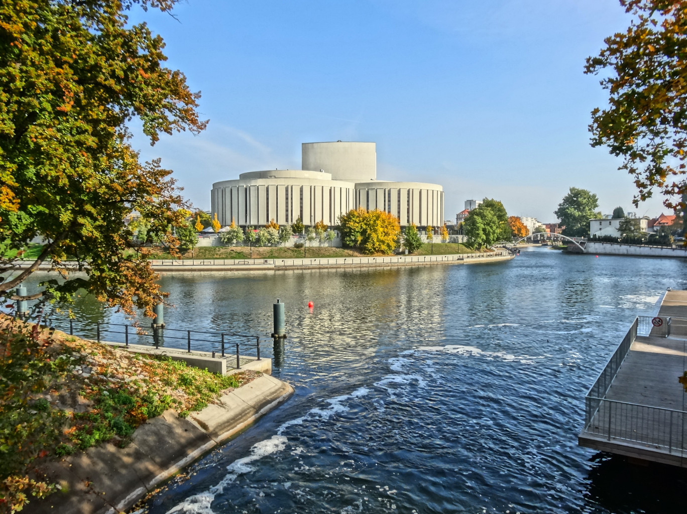 Budynek Opery Nova, zbud. w latach 1973-2006 w Bydgoszczy, ul. Ferdynanda Focha 5